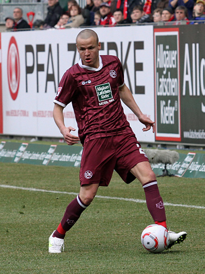 Adam Hlousek, Fußballspieler